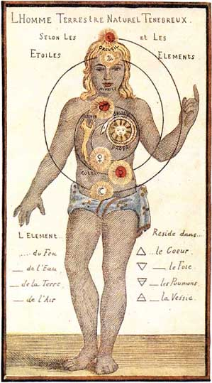 Raffigurazione dei centri segreti del corpo umano secondo il mistico tedesco Johann Georg Gichtel